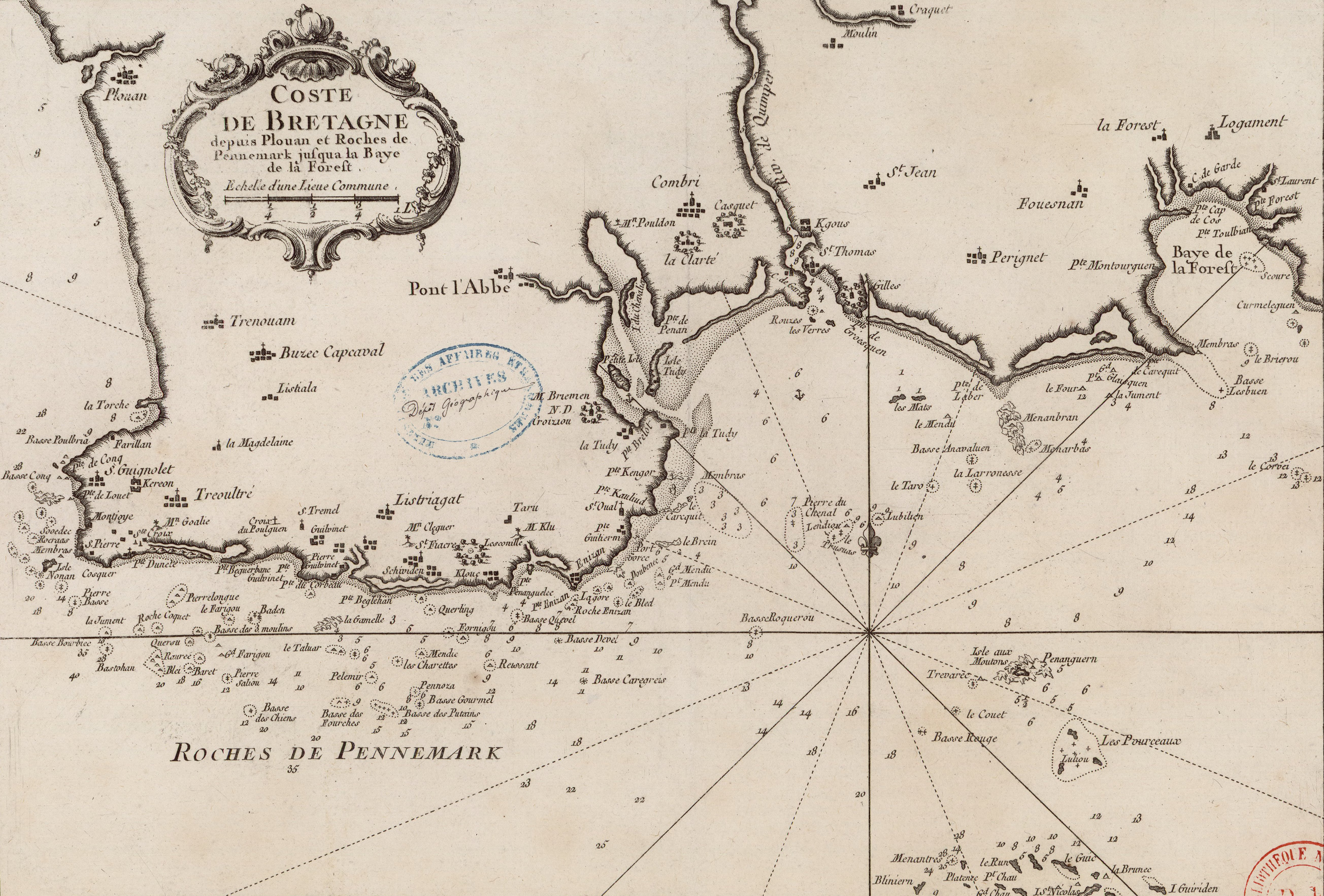 Carte des côtes de Bretagne de Plovan à la baie de La Forêt éditée en 1764 (par Jacques-Nicolas Bellin (1703-1772)